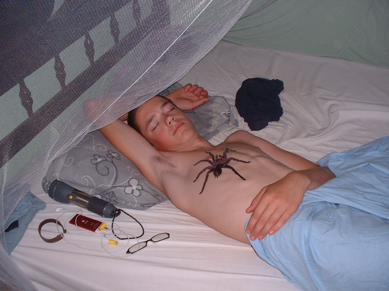 Vogelspin / Bird spider / Araña peluda